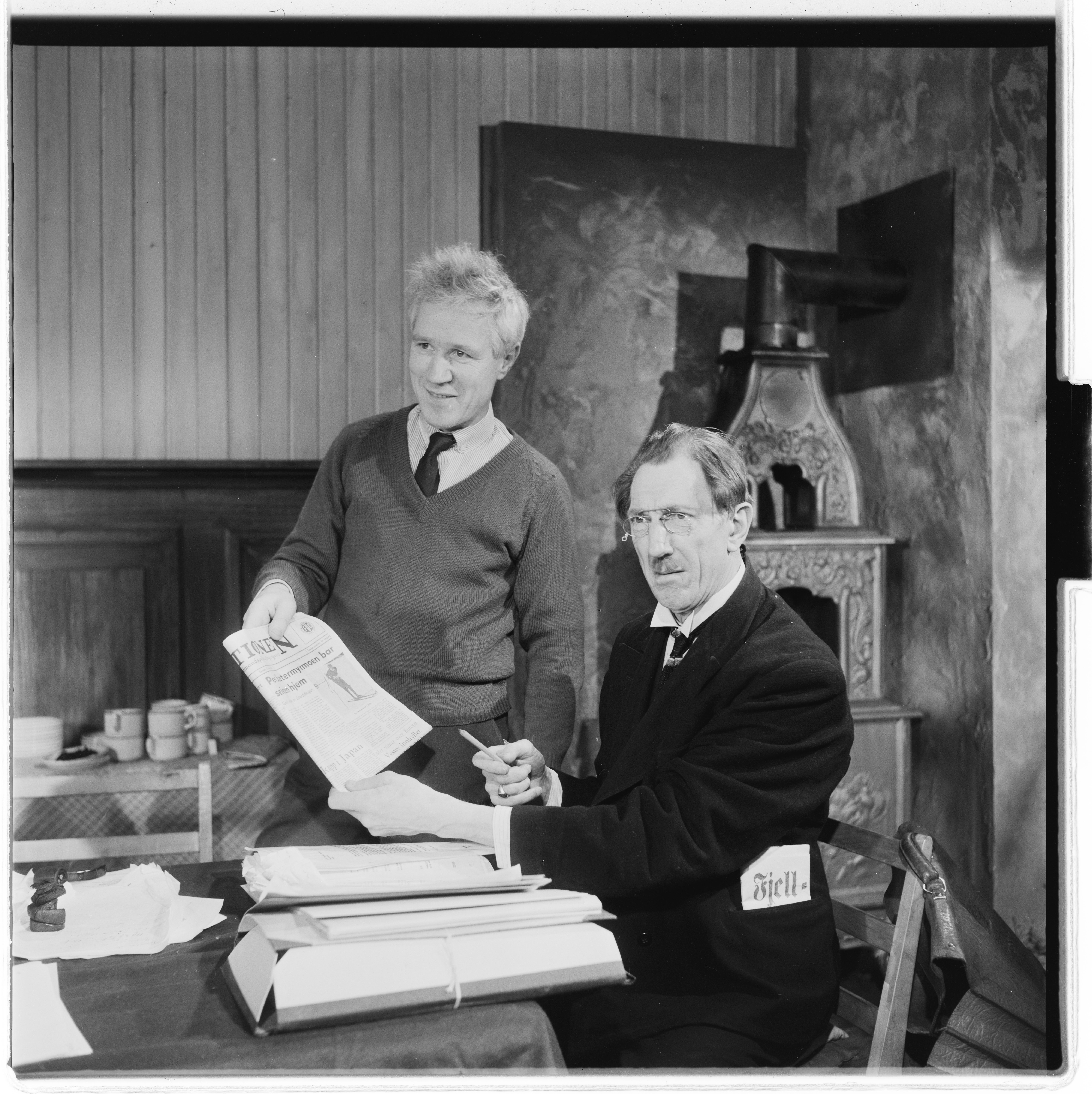 Bildet er hentet fra Arkivverket. Foto tatt i forbindelse med reportasje om den norske filmen Freske fraspark fra 1963. Manus var ved Kjell Aukrust og Bjørn Breigutu. Regi ved Bjørn Breigutu. Kjell Aukrust, Leif Juster, Turid Caldwell, Alfhild Hovdan, Per Bistrup, Lalla Carlsen Arkivinstitusjon : Riksarkivet Arkivnavn : Billedbladet NÅ Sted : Norge, Ukjent, Ukjent, Ukjent Emneord: Menn, Filminnspilling Avbildet: Ukjent